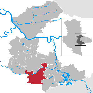 Zörbig, Sachsen-Anhalt - Landkreis Anhalt-Bitterfeld